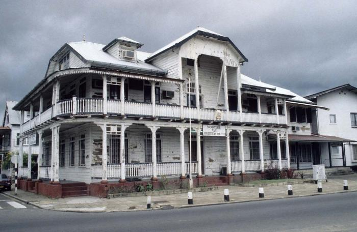 Dia. Waterkant, gebouw van het Ministerie van Justitie en Politie